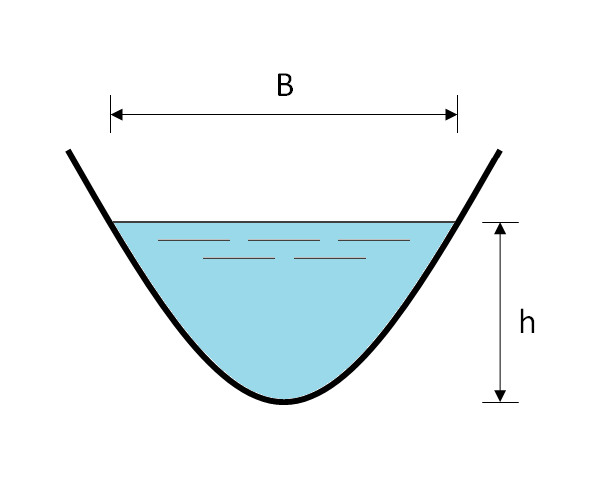 Description Éléments géométriques pour une section de canal parabolique.